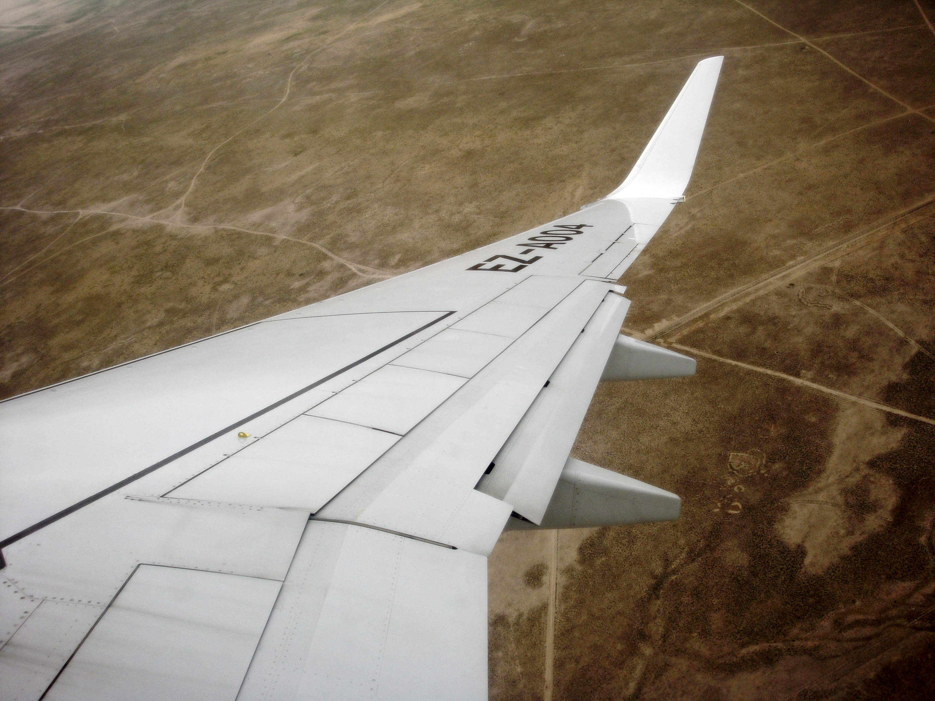 Крыло Боинга 737-800